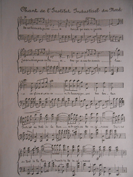 Chant de l'Institut Industriel du Nord de la France - IDN Lille